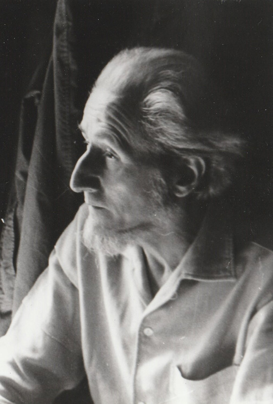 Photo Daniel Gloria artiste peintre à Lyon